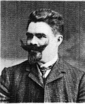 Joseph Wiedemann, Gewerkschaftsvorsitzender und MdR (Zentrumspartei)